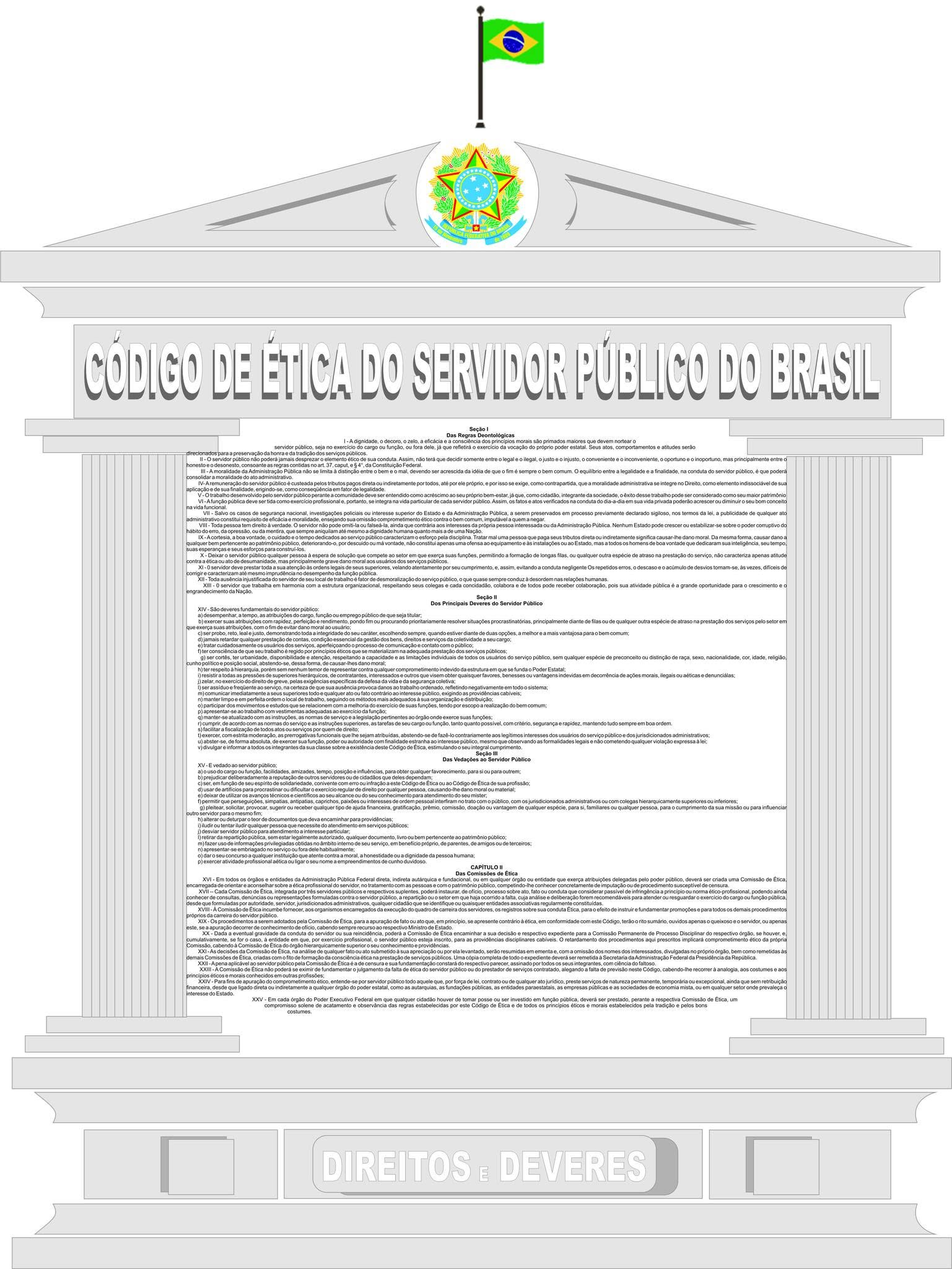 Moldura portical com parte do texto do Eódigo de Ética Prófissional dos servidores Públicos do Brasil